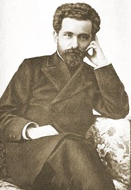 Bild Nikolai Marrs, 1905